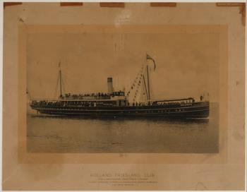 Fotolithografie van de "Bolsward" van de Holland-Frieslandlijn